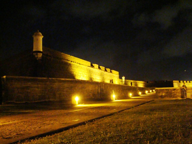 Fortaleza de São José de Macapá, em Macapá no estado do Amapá, Brasil.